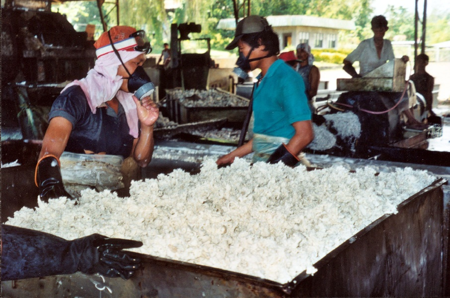 Philippinen: Latex-Fabrik in Basilan